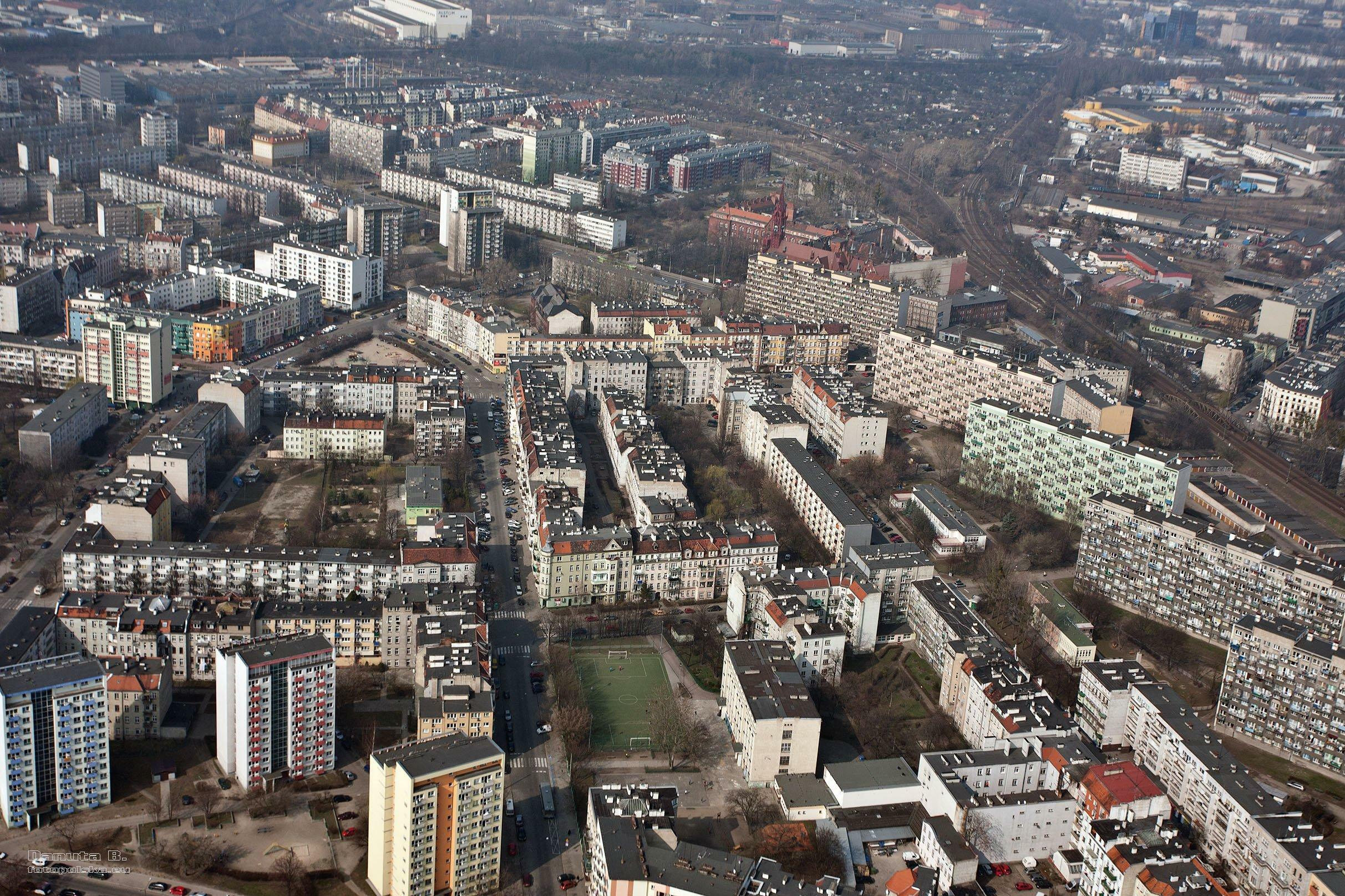 Oś ul. Szczęśliwej (pod 13 sklep wyłącznie z piwem po sufit) wiedzie do trójkątnego placu Lejba Pereca. Częściowo zachowana w tym rejonie przedwojenna zabudowa.